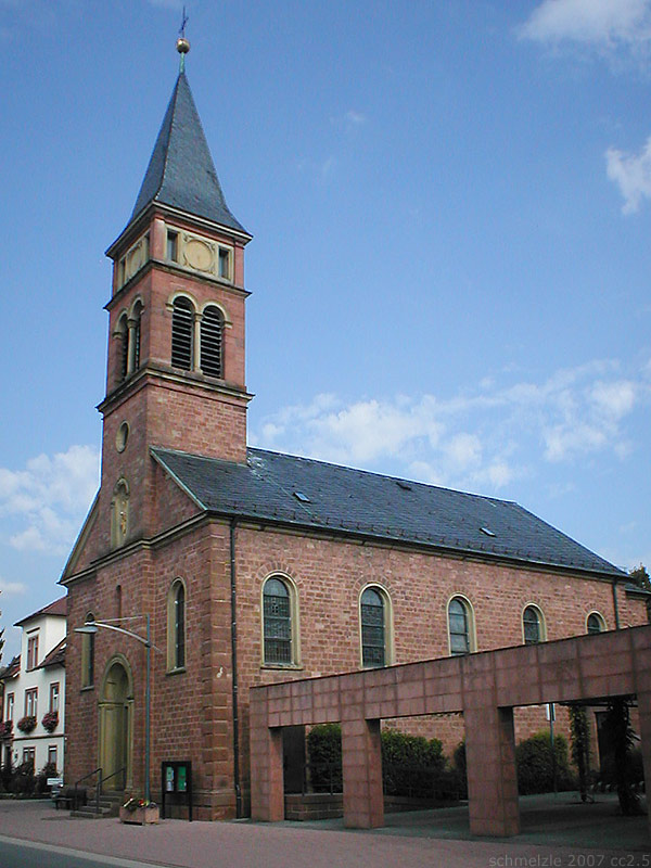 Katholische Kirche in Mauer, Baden-Württemberg, Deutschland